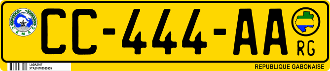 Схематичне зображення номерного знаку